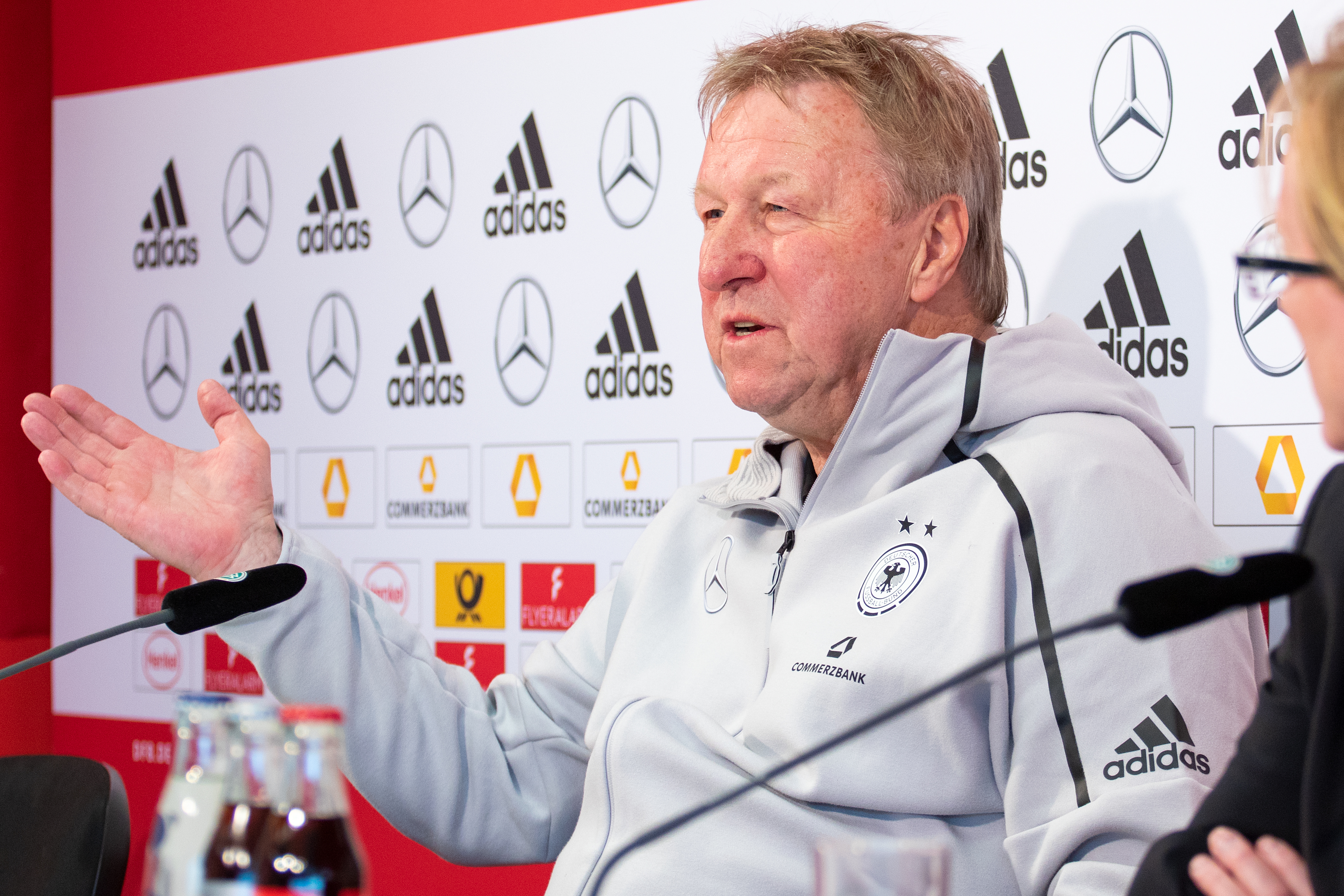 Horst Hrubesch auf der Pressekonferenz nach dem Spiel Deutschland vs. Tschechien (WM-Qualifikation) am 7. April 2018